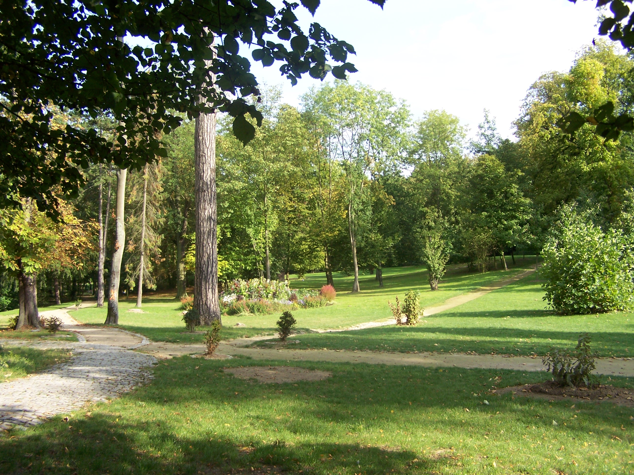 Parc des Missionnaires à Fontenay-le Fleury (Yvelines, France)